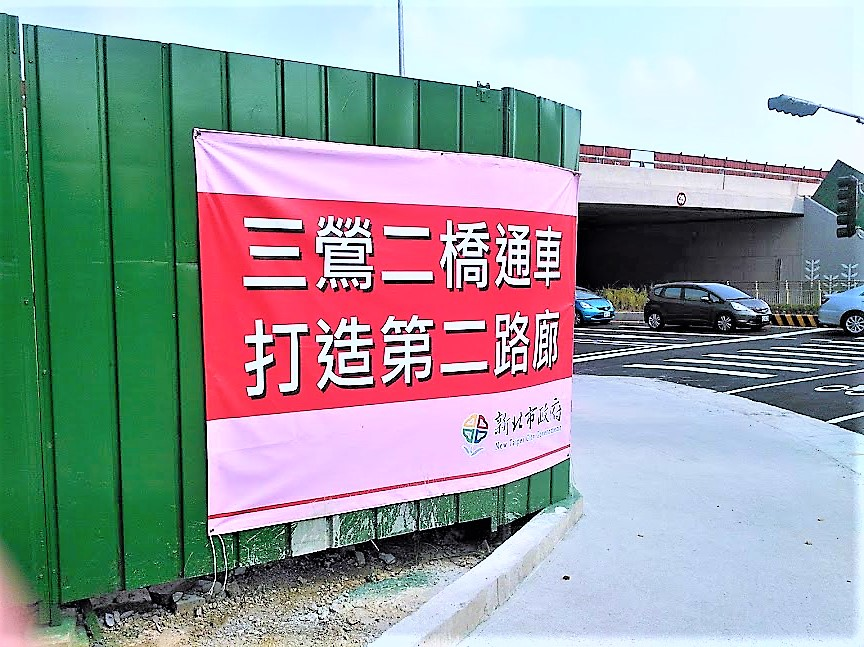 中文（台灣）: 新北市三鶯二橋通車，打造自行車路廊三峽往鶯歌替代路線。